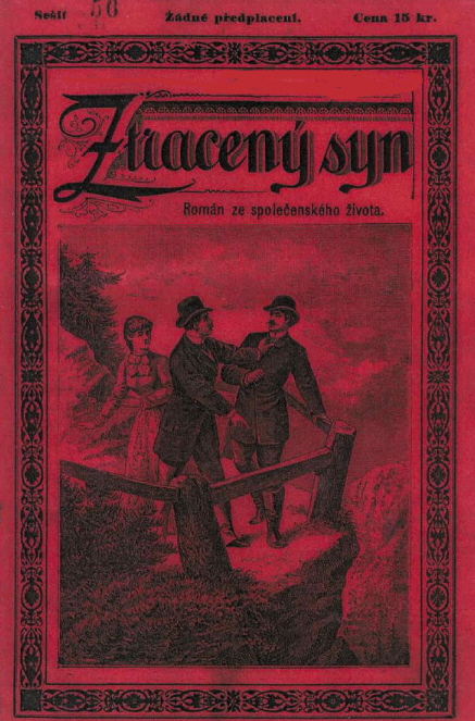 Ilustrace k románu Karla Maye Ztracený syn